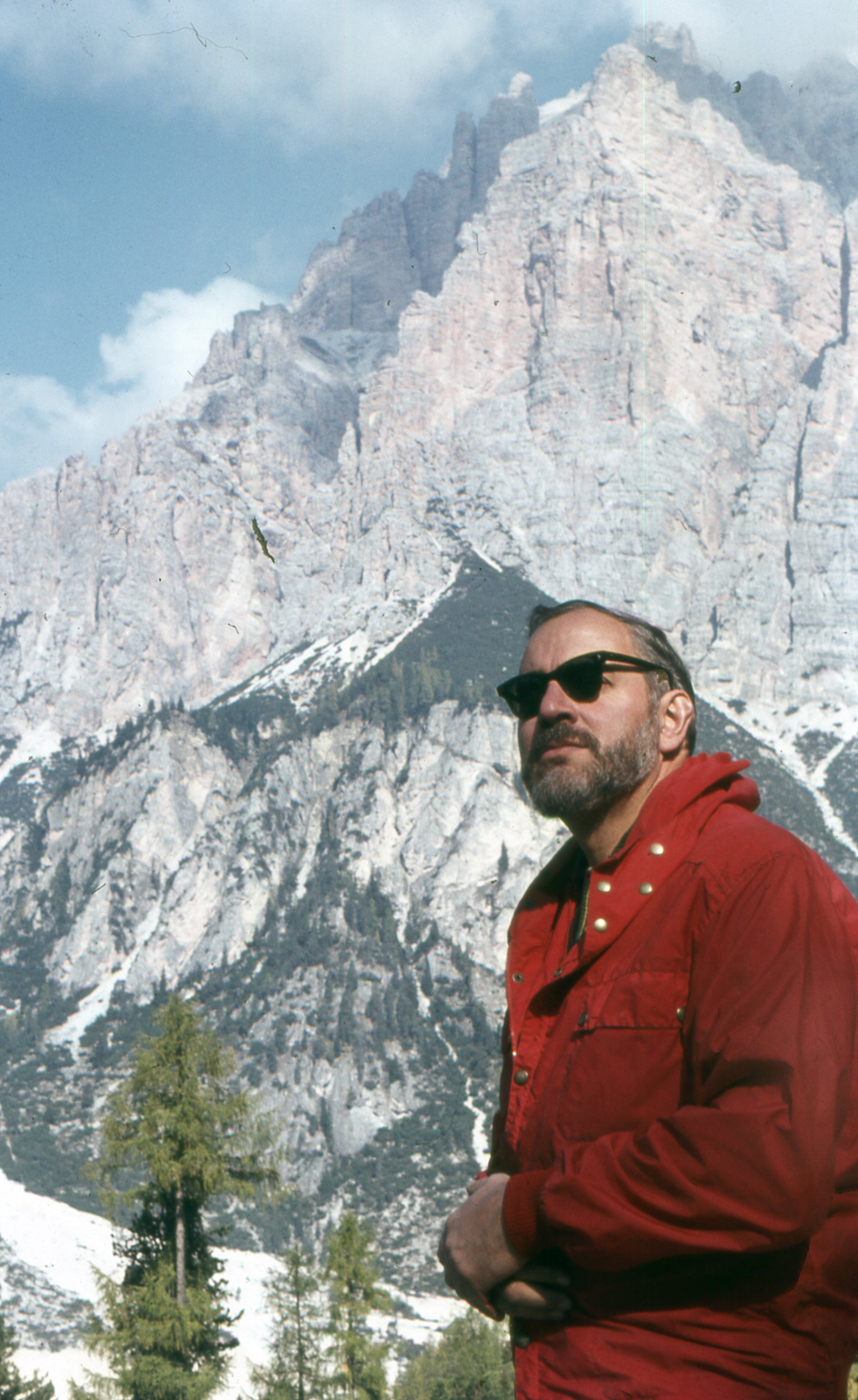 Marcian David Bleahu